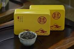 ชาเหลืองในบรรจุ